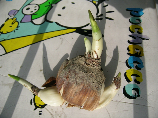 水仙的鳞茎 smartneddy摄于2005年1月